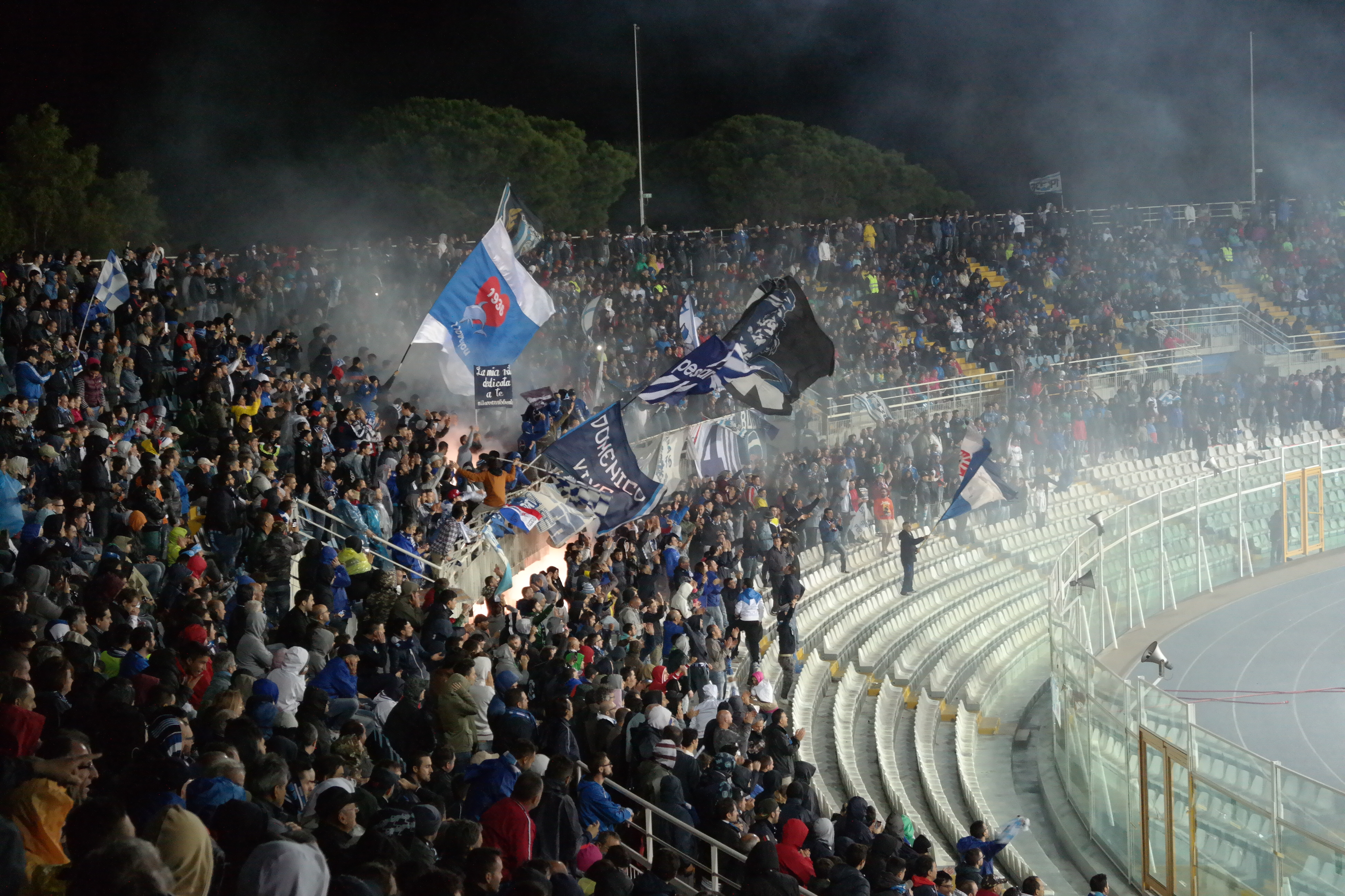 Curva Nord dello Stadio Adriatico di Pescara